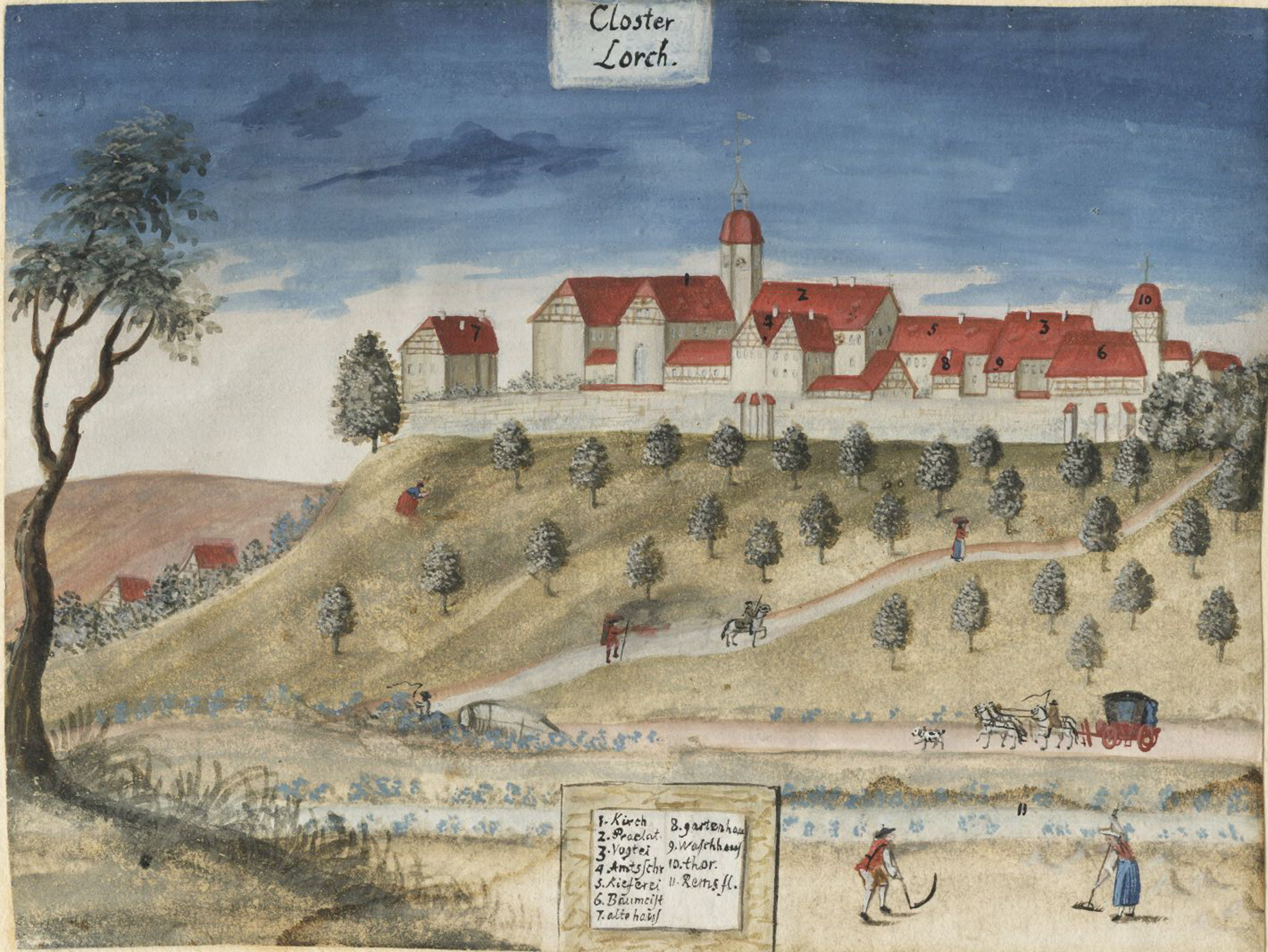 Kloster Lorch historische Ansicht des Klosters in einer aquarellierten Zeichnung aus der zweiten Hälfte des 18. Jahrhunderts Foto: Stadtarchiv Lorch